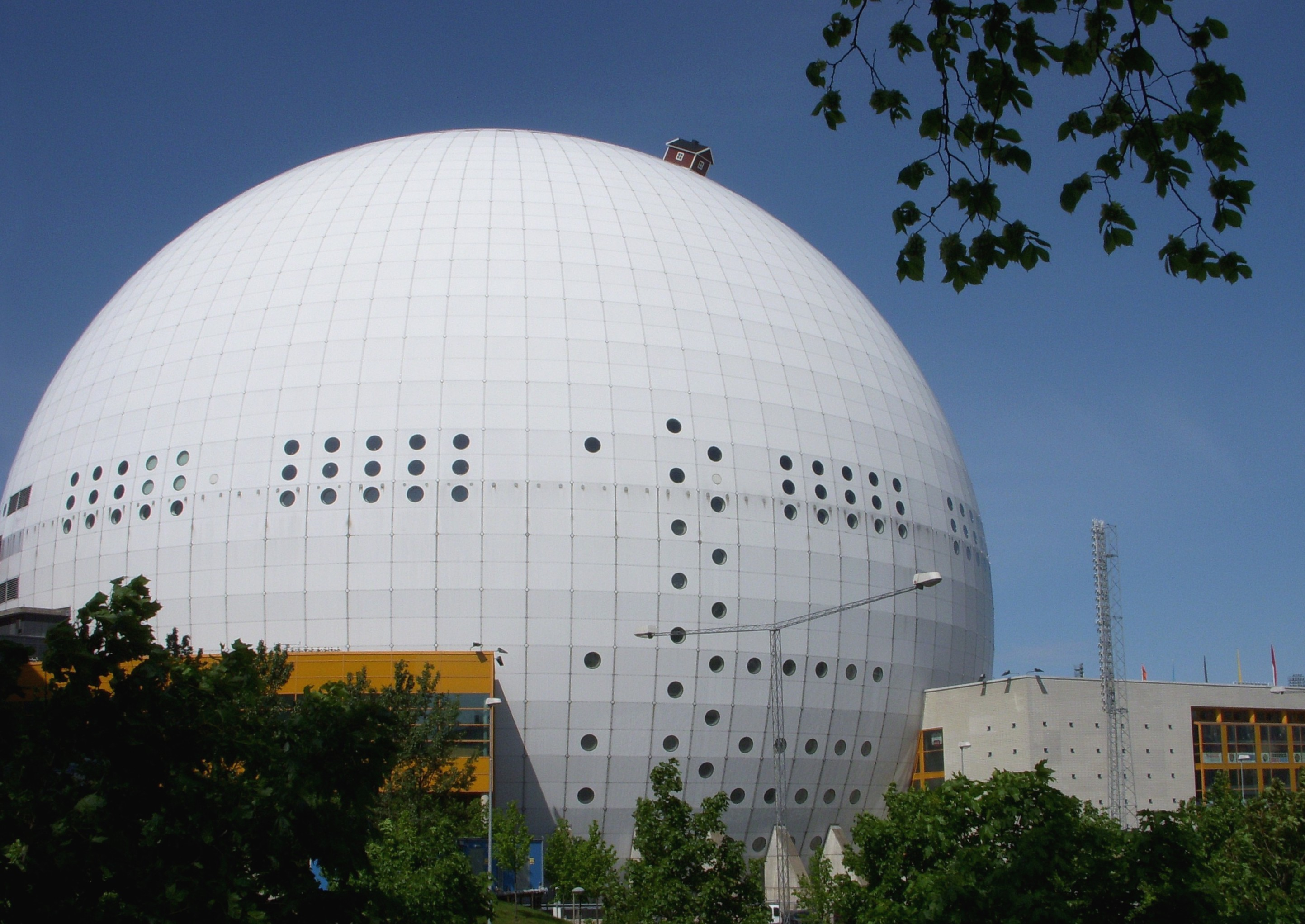 En röd liten stuga på Globen på 20 års jubileum 26 maj 2009